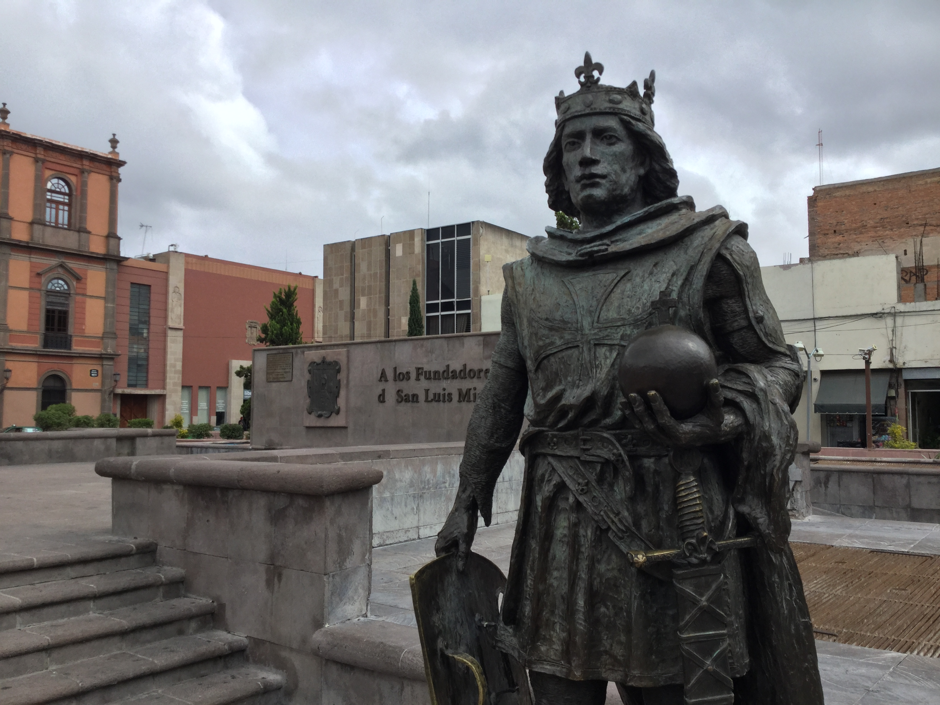 Escultura de San Luis Rey, Centro Histórico de San Luis Potosí.